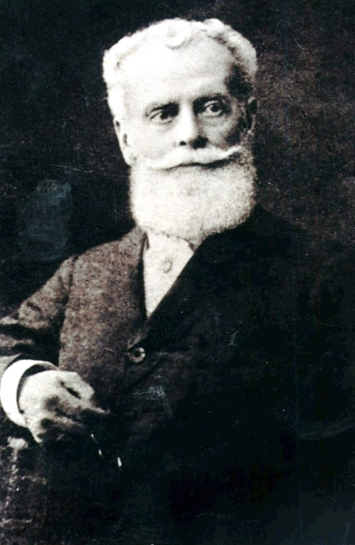 El caudillo peruano Nicolás de Piérola, jefe supremo del Perú de 1879 a 1881 y presidente constitucional de 1895 a 1899. Fotografía del año 1910.